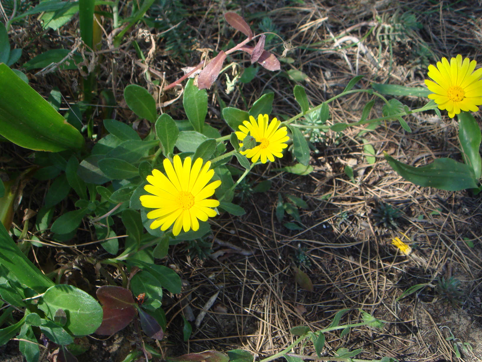 Calendula suffruticosa subsp. lusitanica (Boiss.) Ohle costa de Cádiz, España